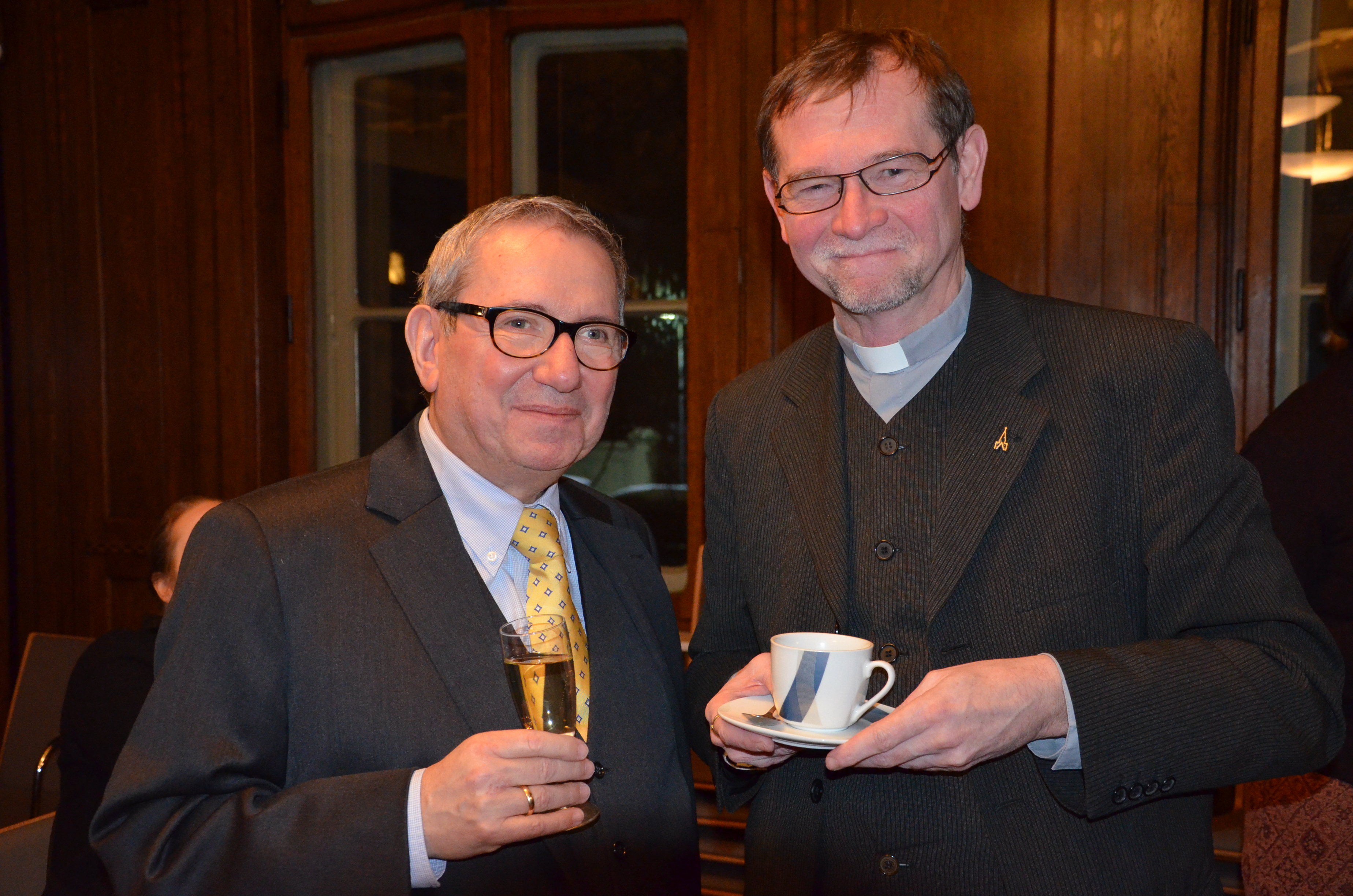 Langjährige Weggefährten: Professor Andor Izsák vom Europäischen Zentrum für Jüdische Musik und der stellvertretende Stadtsuperintendent von Hannover, Thomas Höflich, hier kurz nach der Eröffnung der Wanderausstellung Synagoge und Tempel in der Villa Seligmann ...